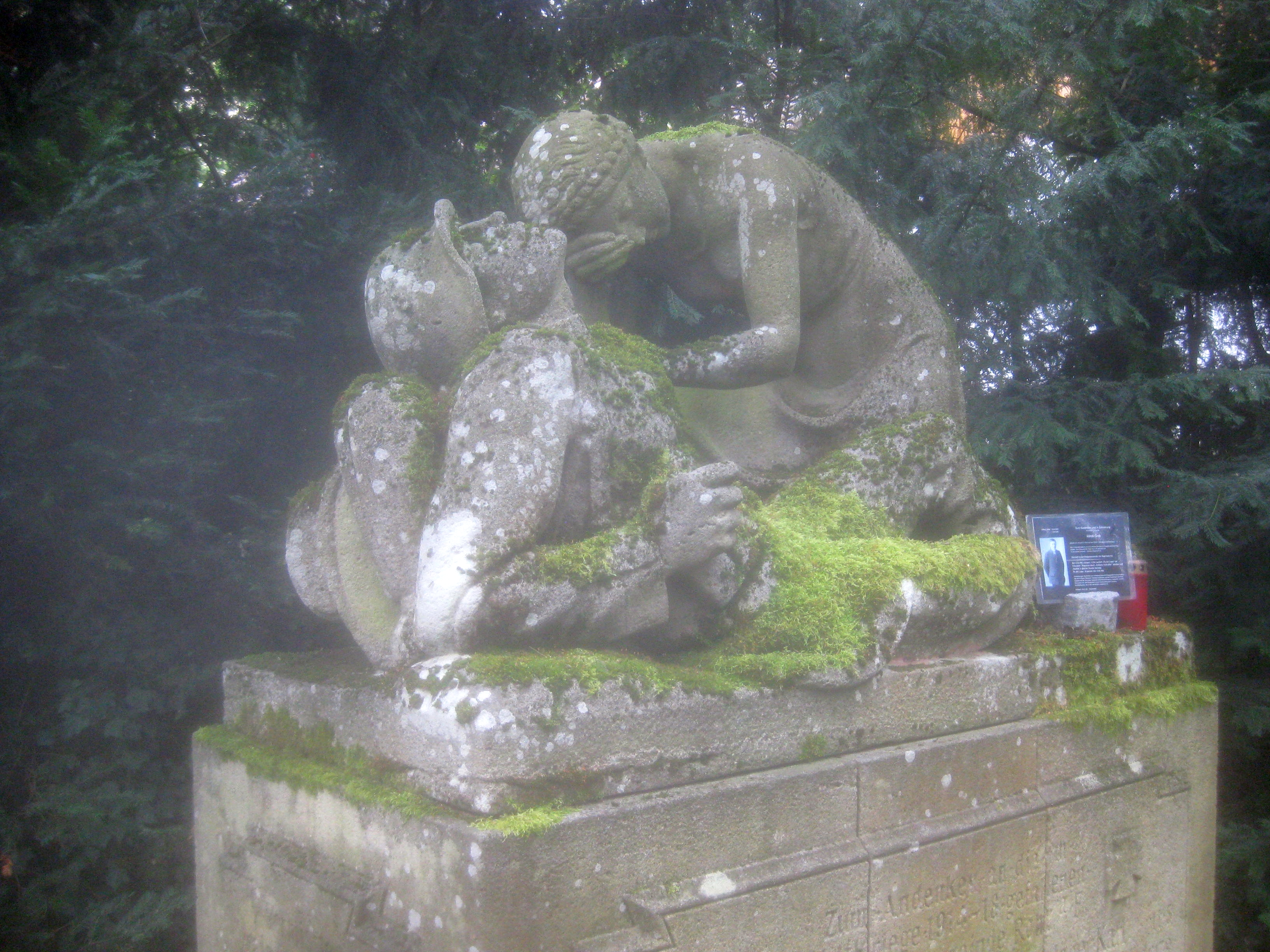 Mahnmal für die im Ersten Weltkrieg gefallenen Söhne der Gemeinde Rohr, Figurengruppe von Hermann Jung (1876–vor 1939), Stuttgart, Friedhof Rohr.